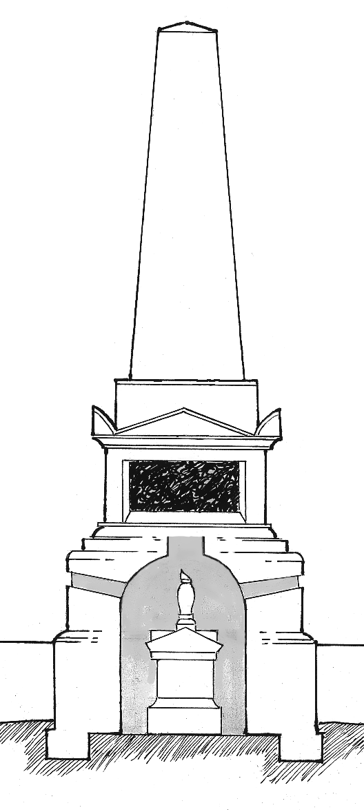 Schematische Bauansicht des Monument General Hoche. 5. Schematische Bauansicht nach einem Aufriss von 1907. Zeichnung des Autors